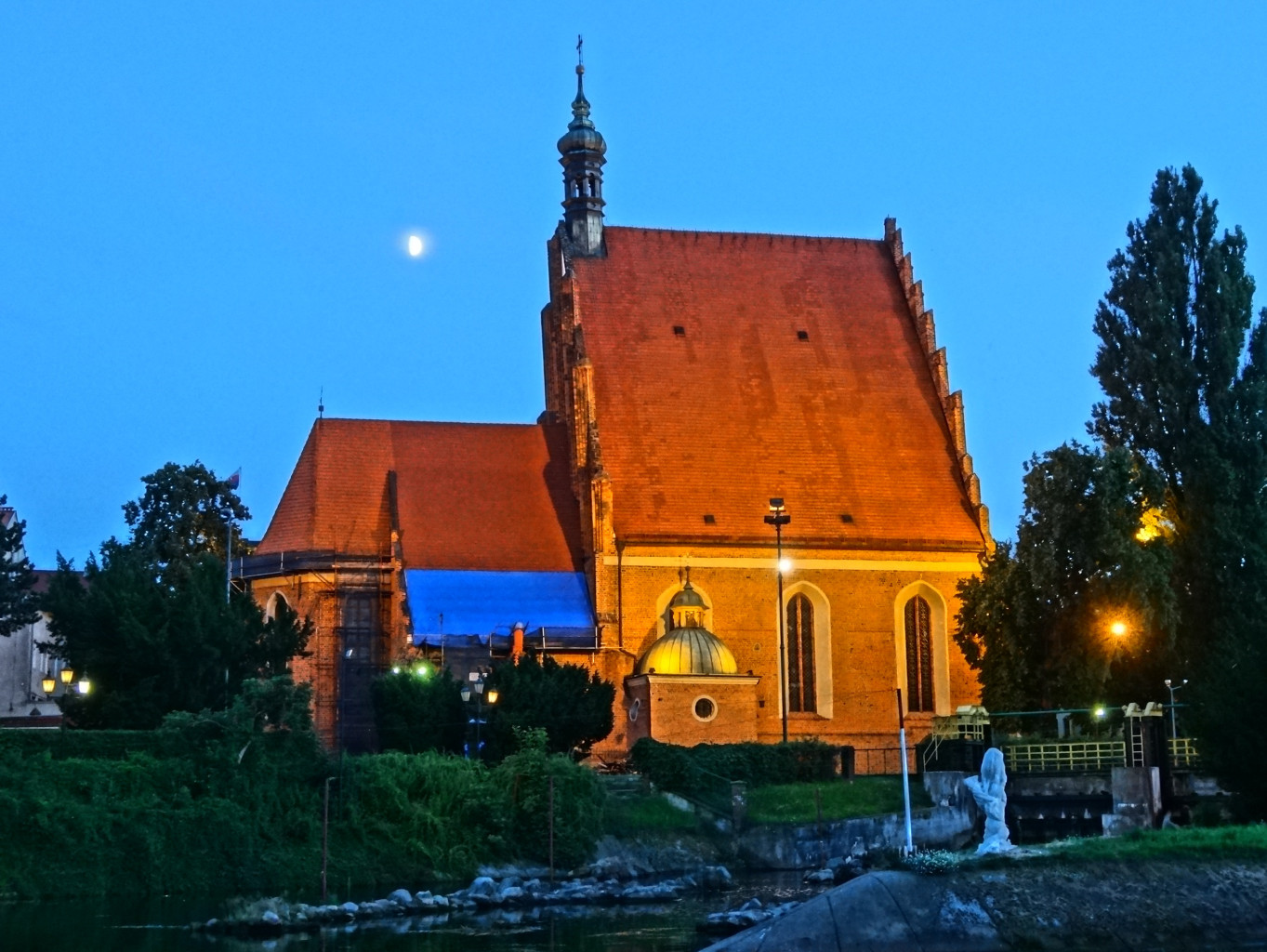 Katedra p.w. św. Marcina i Mikołaja w Bydgoszczy (XIV-XV wiek)